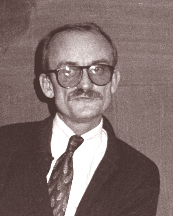 Prof. Dr. Martin Dannecker, stellvertretender Direktor am Institut für Sexualwissenschaft der Universität Frankfurt.